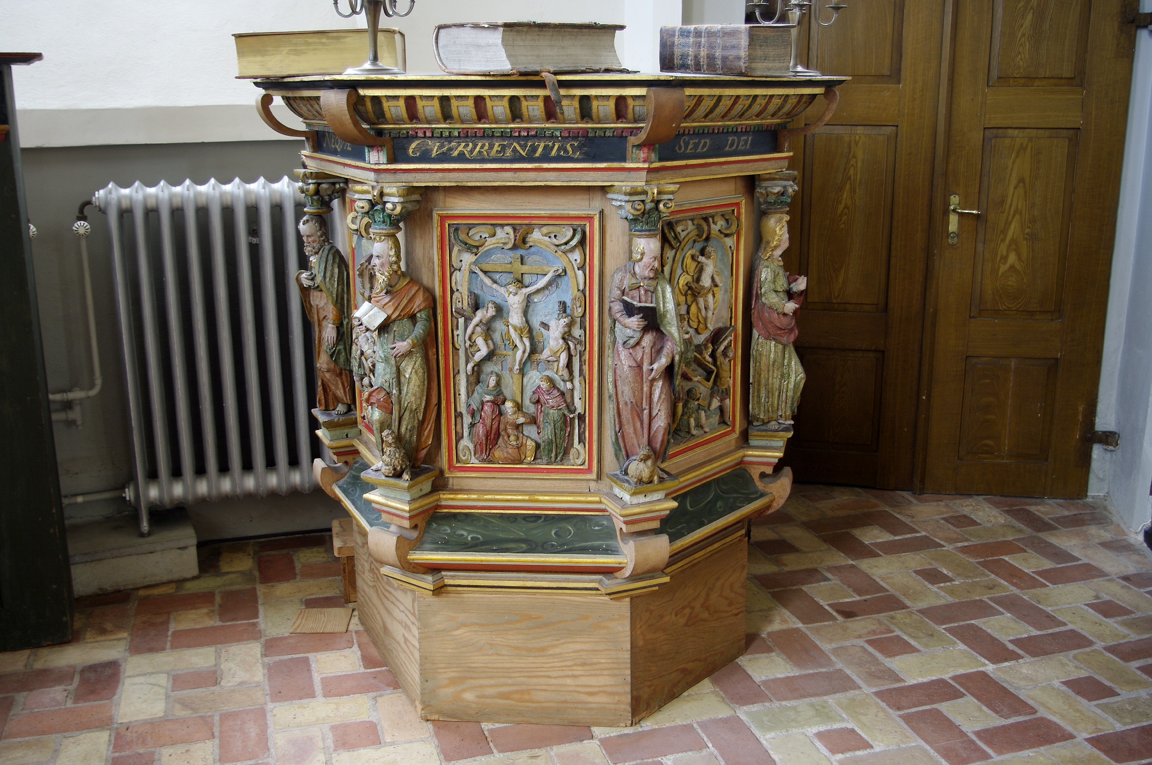 Predikstol, Håslöv kyrka, Skåne, Sweden.